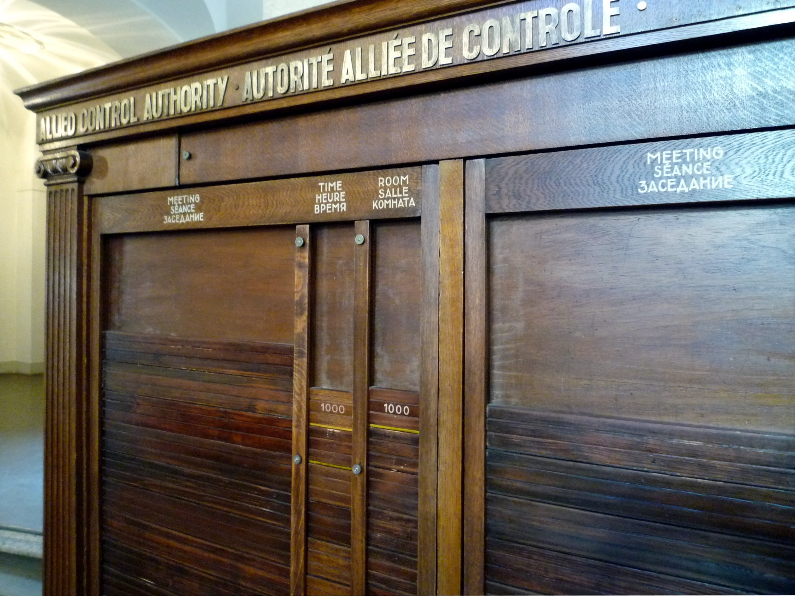 Gebäude des Kammergerichts in Berlin-Schöneberg. Termintafel des Alliierten Kontrollrats, der nach dem 2. Weltkrieg in diesem Gebäude untergebracht war.